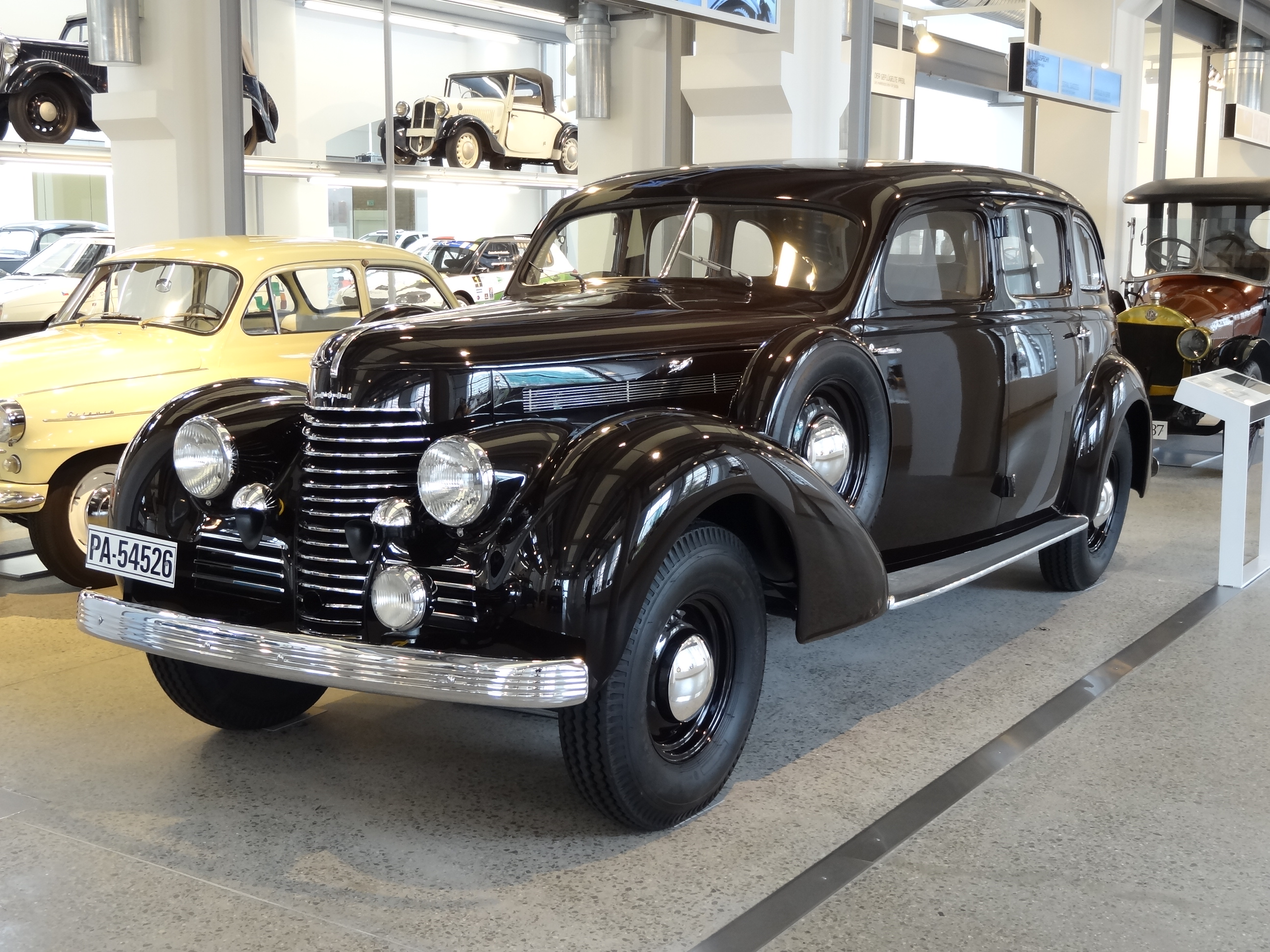 "Er wird als luxuriöses Flagschiff der Modellpalette entworfen: derSkoda Superb 4000 mit V8 Zylinder-Motor. Zehn Exemplare sind fertiggestellt, bevor der Zweite Weltkrieg ausbricht. Die 6-Zylinder-Variante Superb 3000 wird dann in hoher Stückzahl auch als Militärfahrzeug gebaut" (Hinweistafel)